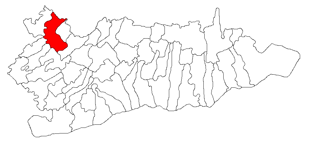 Categorie:Hărţi ale judeţului Călăraşi